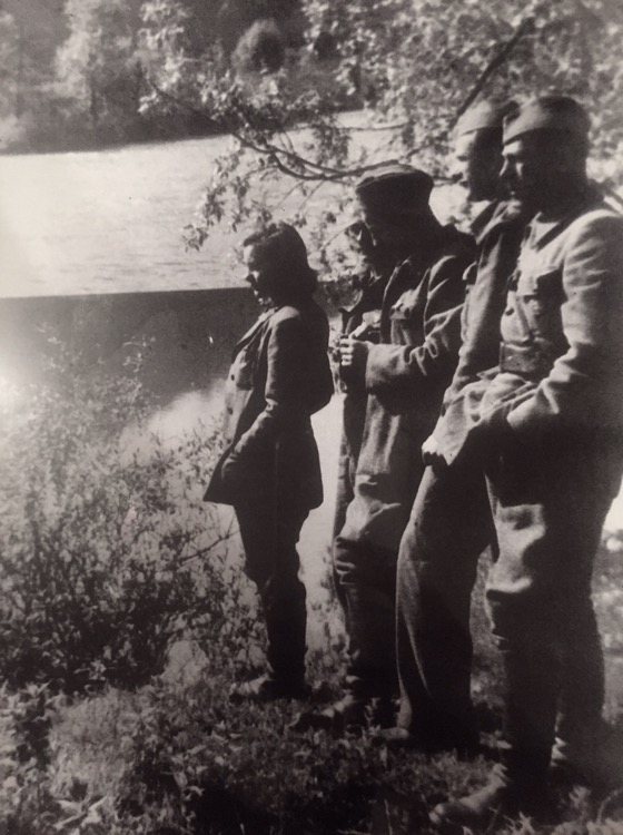 Marta Brilej